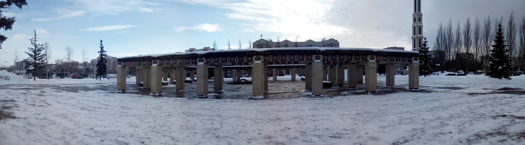 Пантеон Героев - Парк Победы Казань